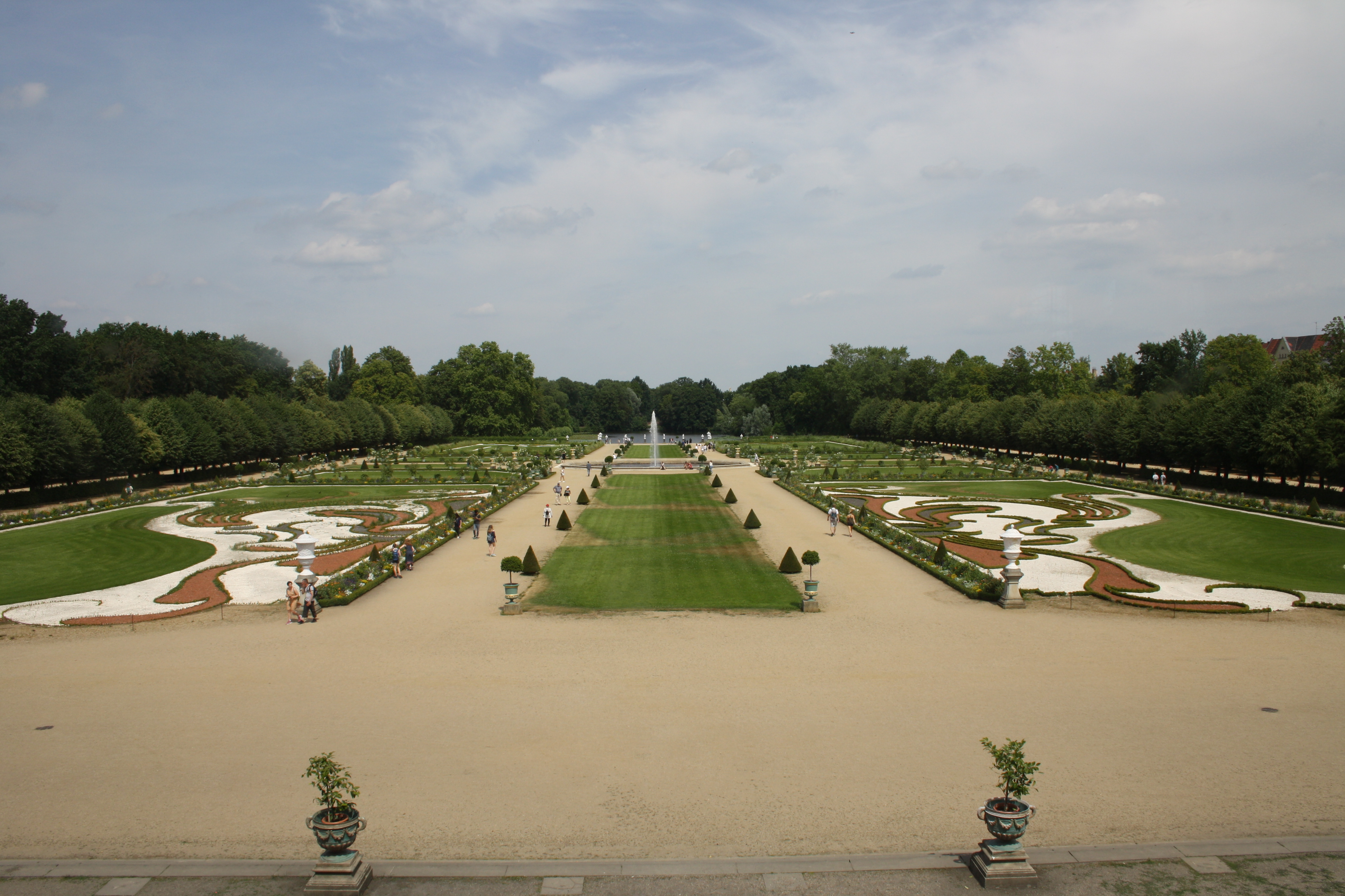 Schloss Charlottenburg, Park